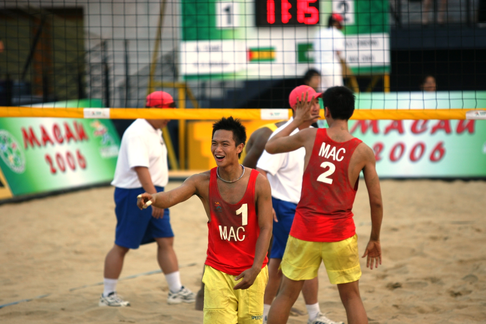 A partida de vôleibol de praia em Academia de Ténis durante os Jogos da Lusofonia de Macau em 15 de Outubro de 2006